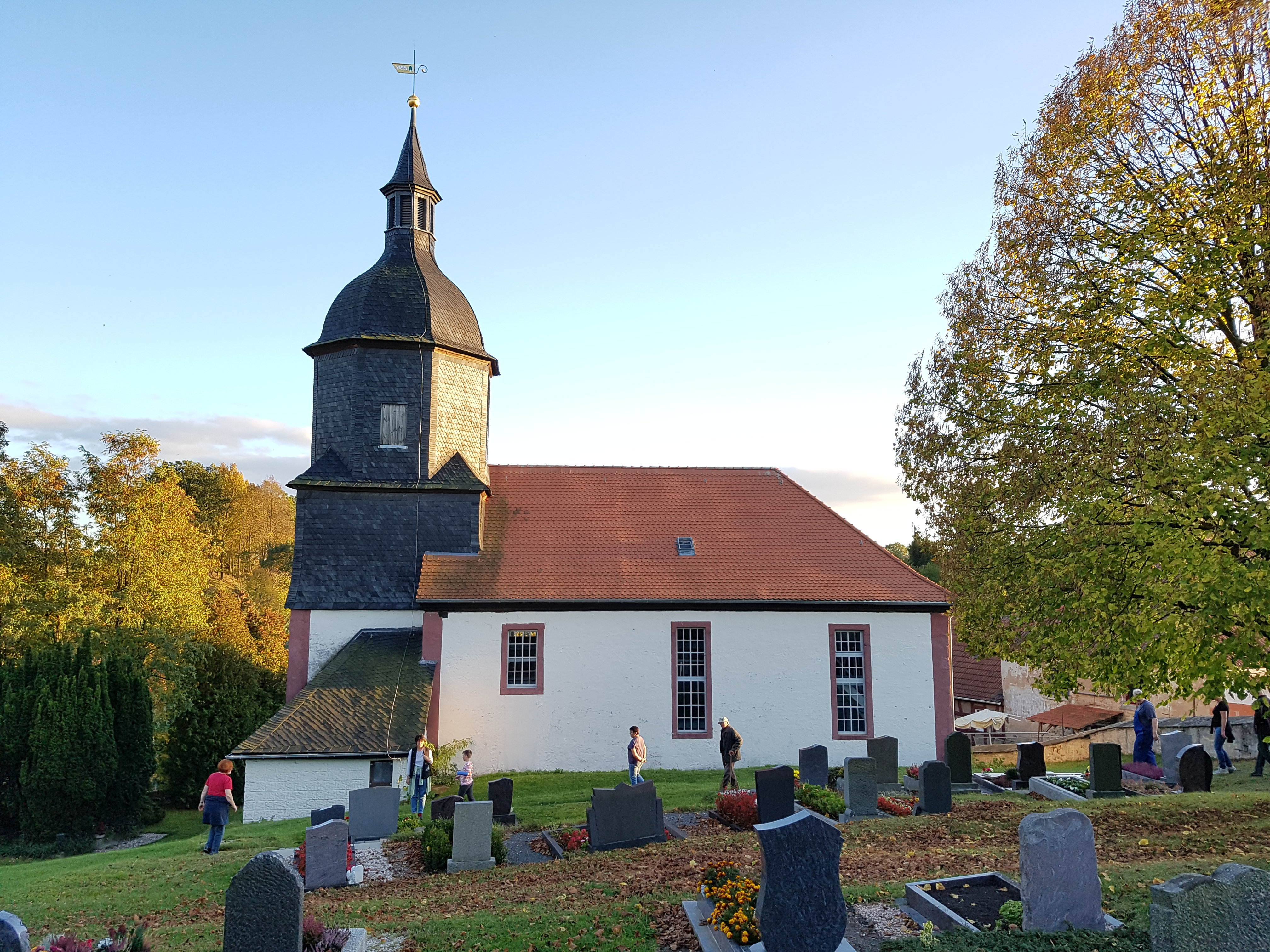 evang. Dorfkirche Lindenkreuz im Kreis Greiz (Thüringen)